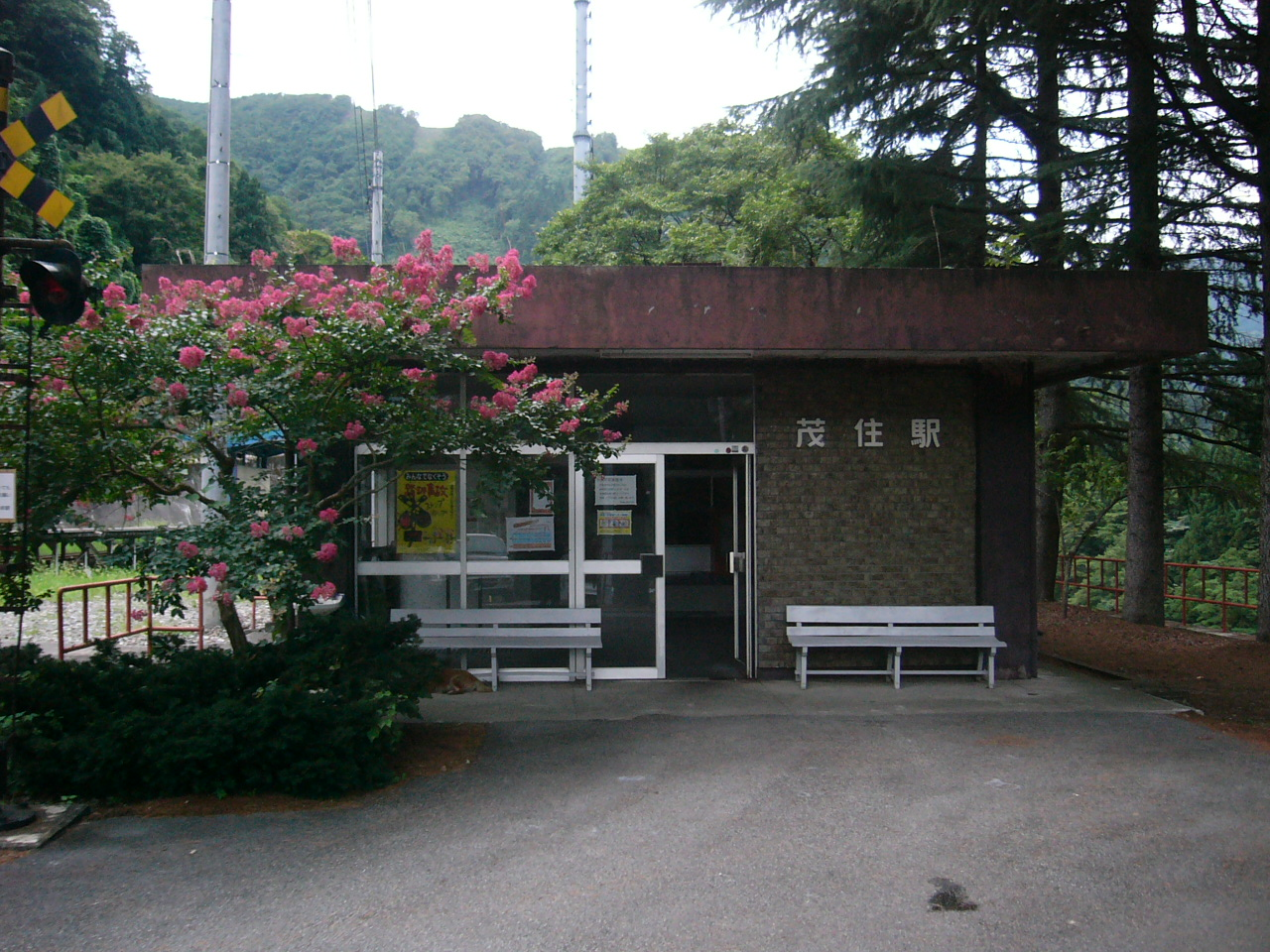 Mozumi Station